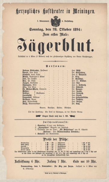 Theaterzettel des Hoftheaters in Meiningen zu Jägerblut